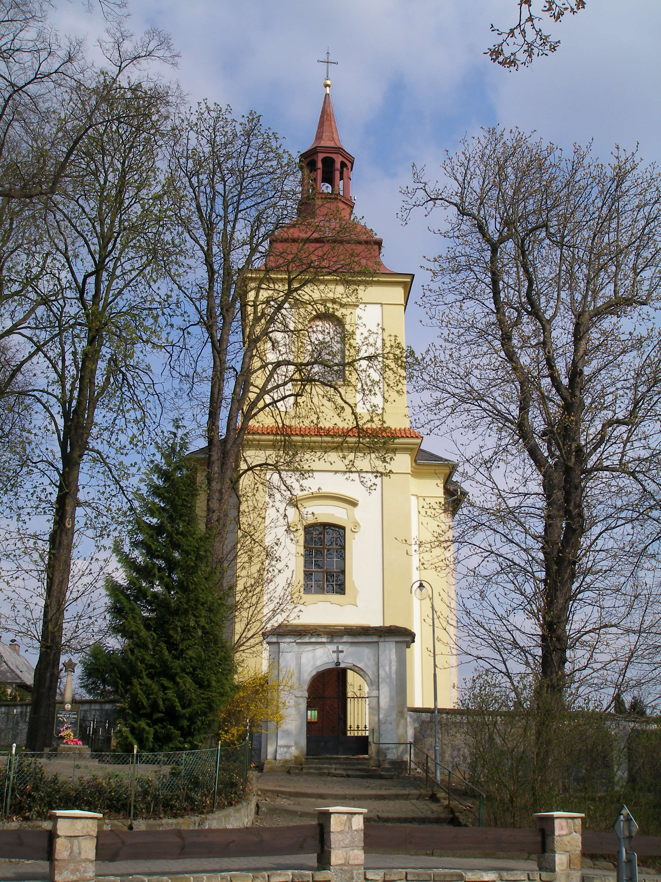 Kostel svatého Václava v Bosni.